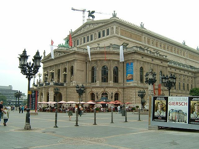 Opernplatz Frankfurt am Main